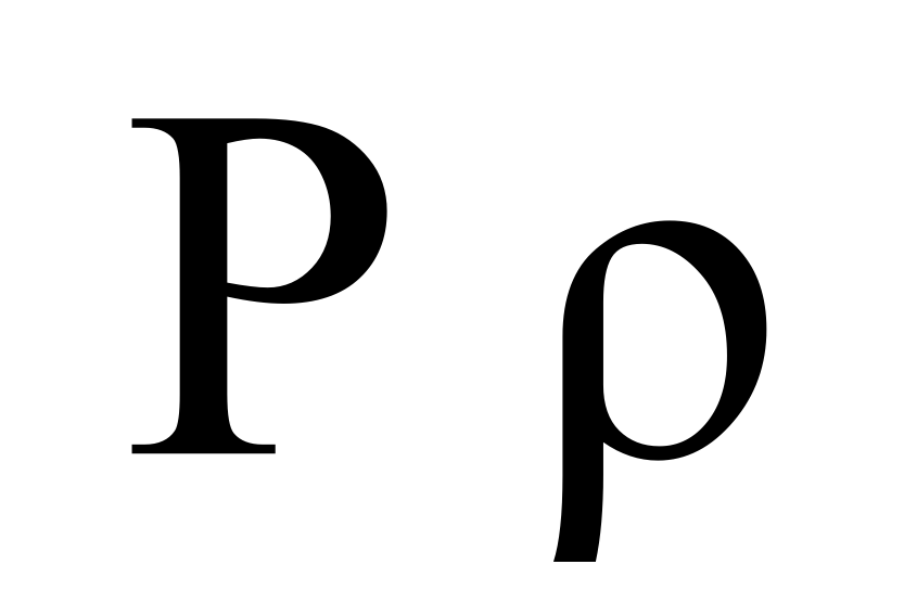 greek letter rho